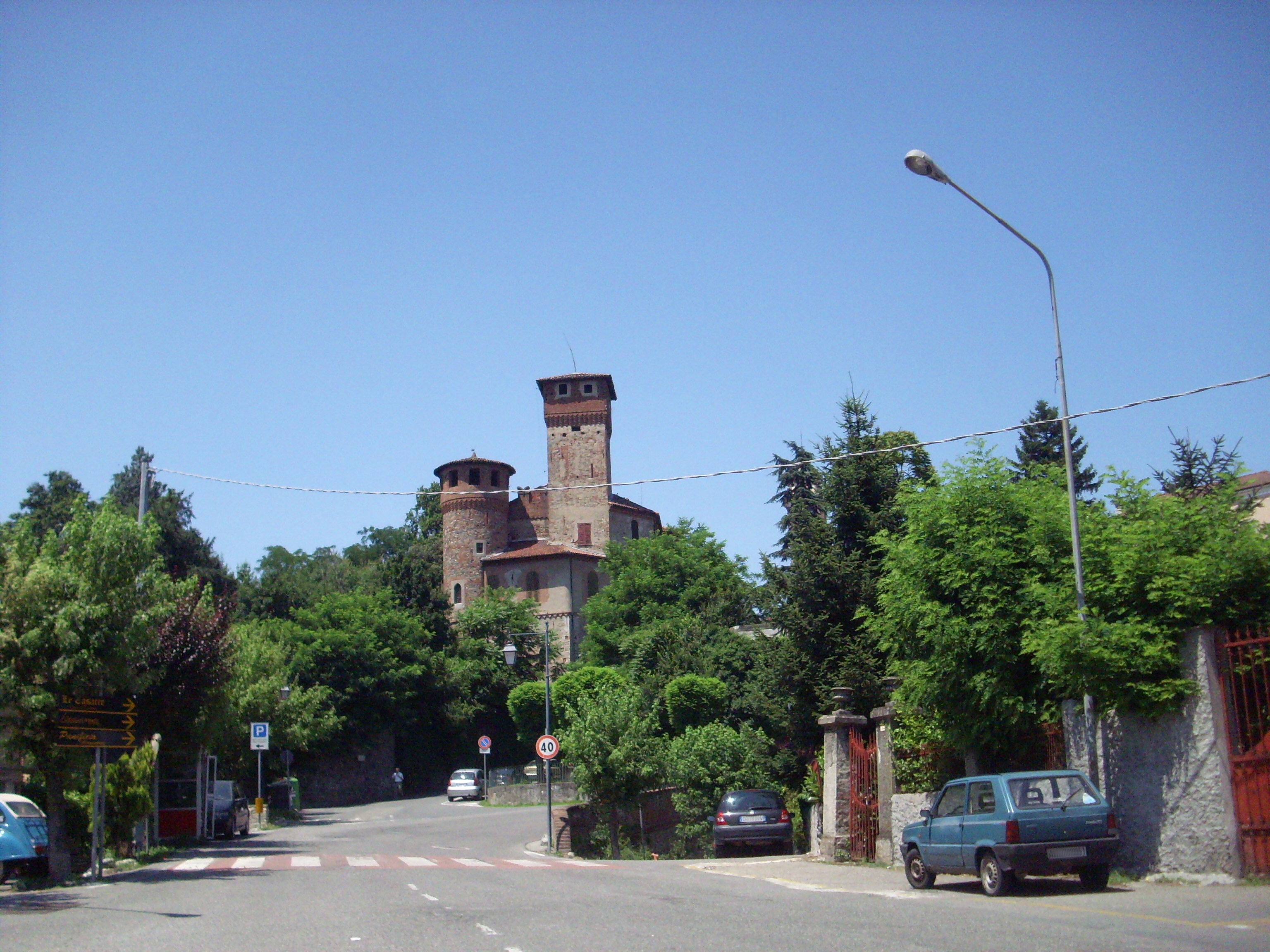 Molare, in provincia di Alessandria